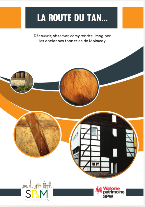 Carnet réalisé dans le cadre d'un projet de sensibilisation au patrimoine de Malmedy.